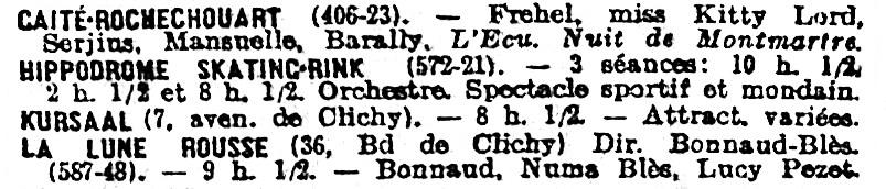 Spectacles, dont celui de l'Hippodrome de Montmartre.